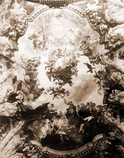 Church Messina Chiesa di San Eustochia